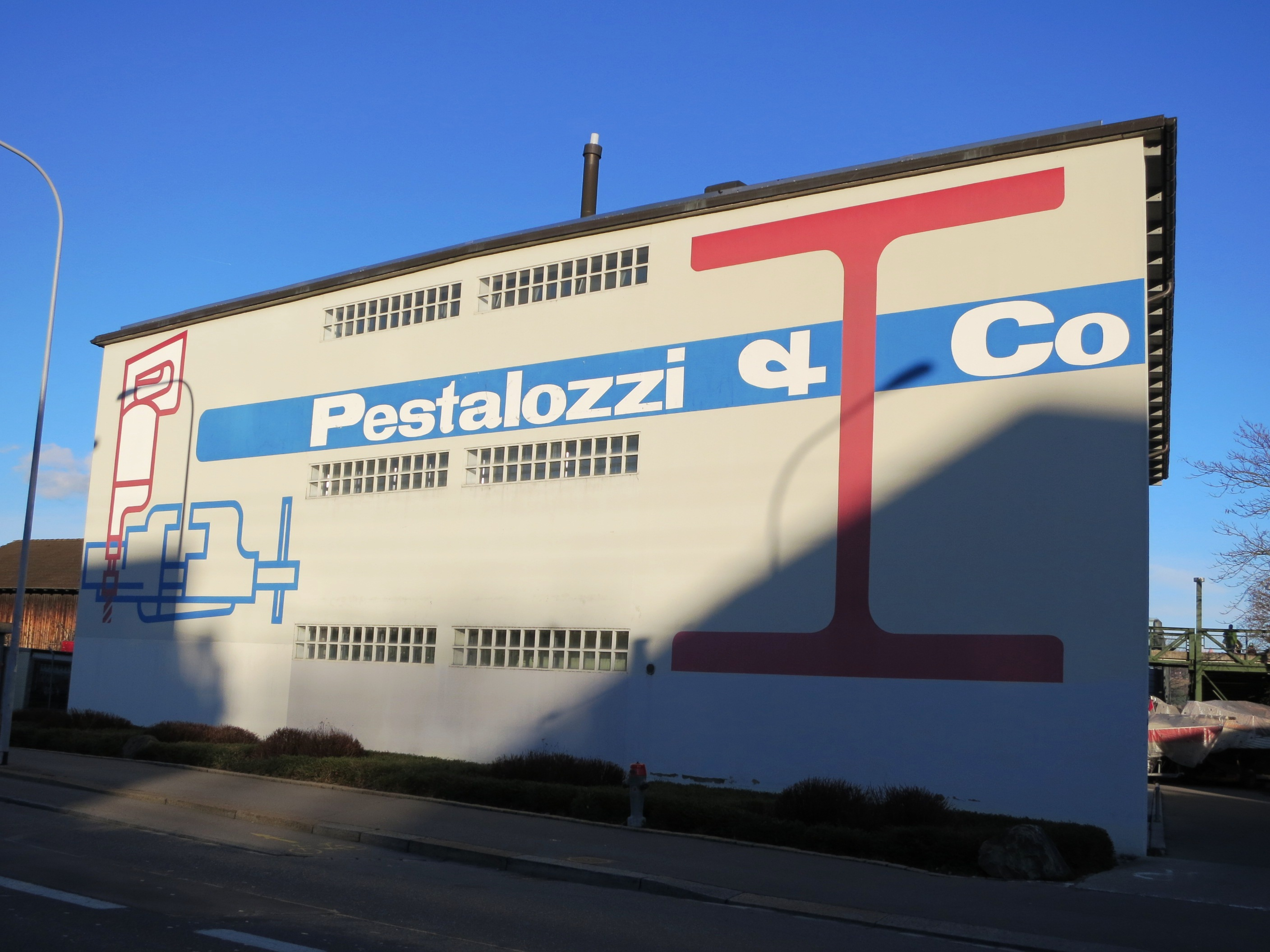 Magazin, Zürich-Wollishofen, Schweiz